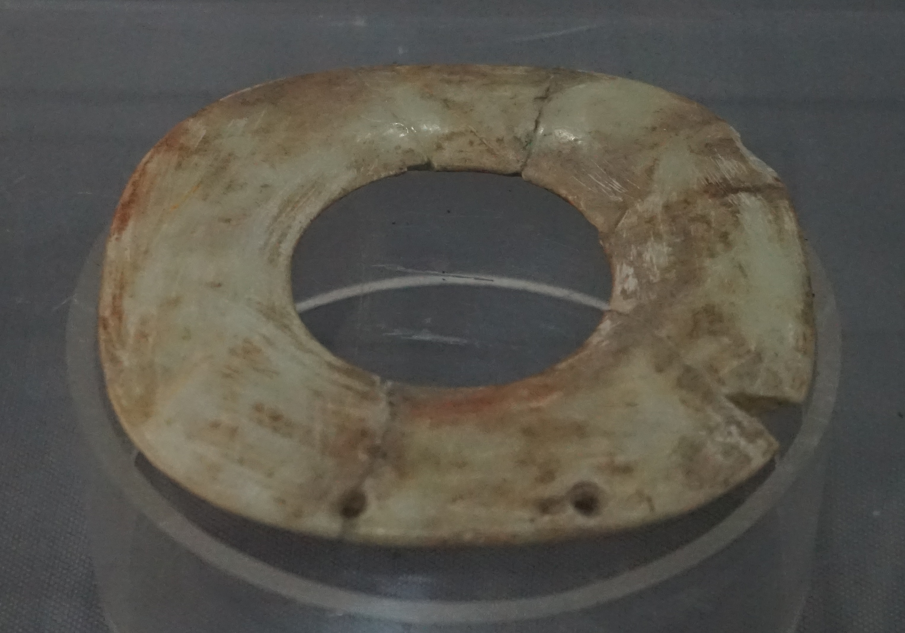 中文（中国大陆）: 大型玉璧。新石器时代。烟筒屯镇新合村征集